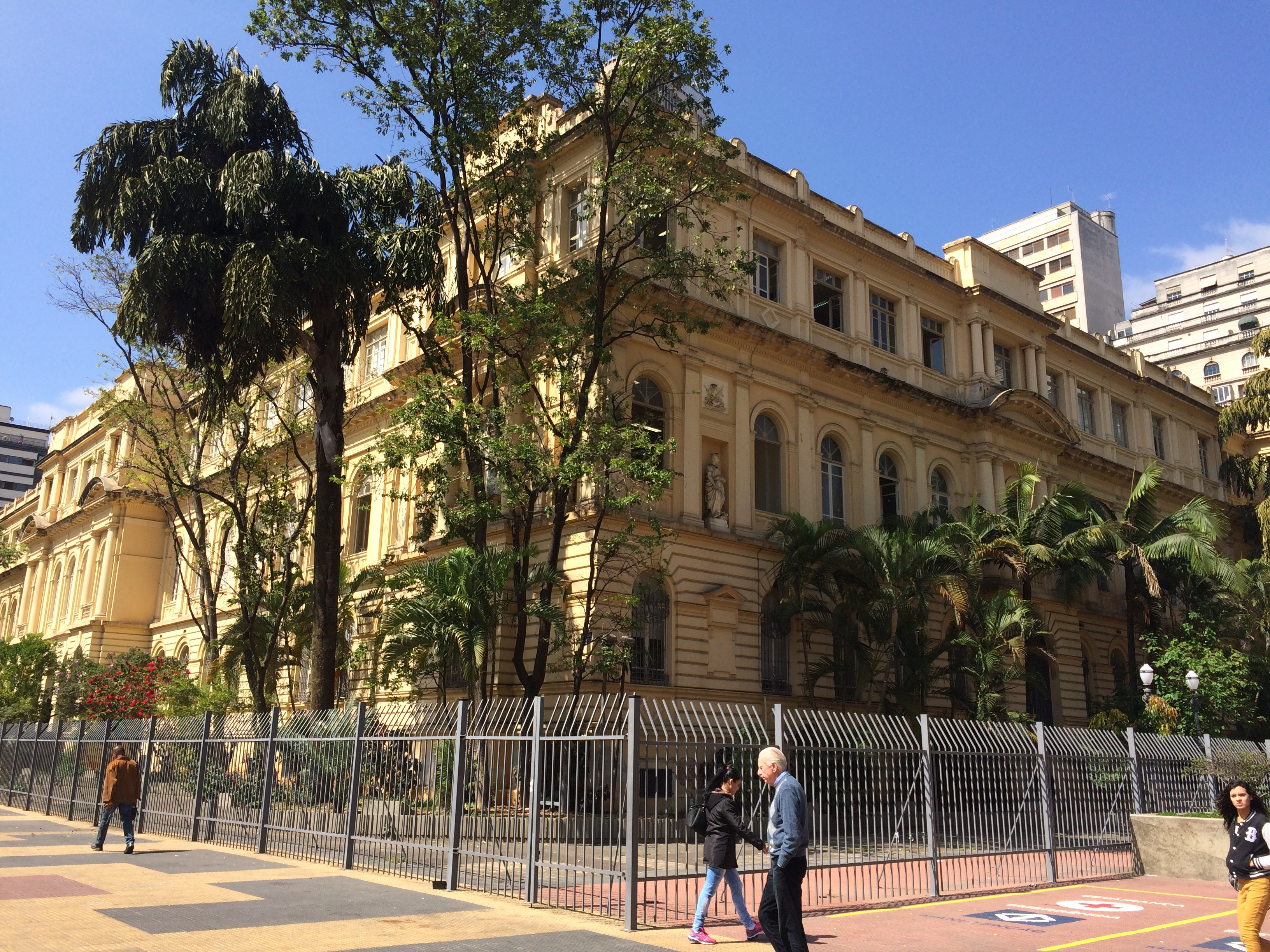 Detalhes das fachadas frontal e lateral do prédio da Casa Caetano de Campos, em São Paulo (SP)